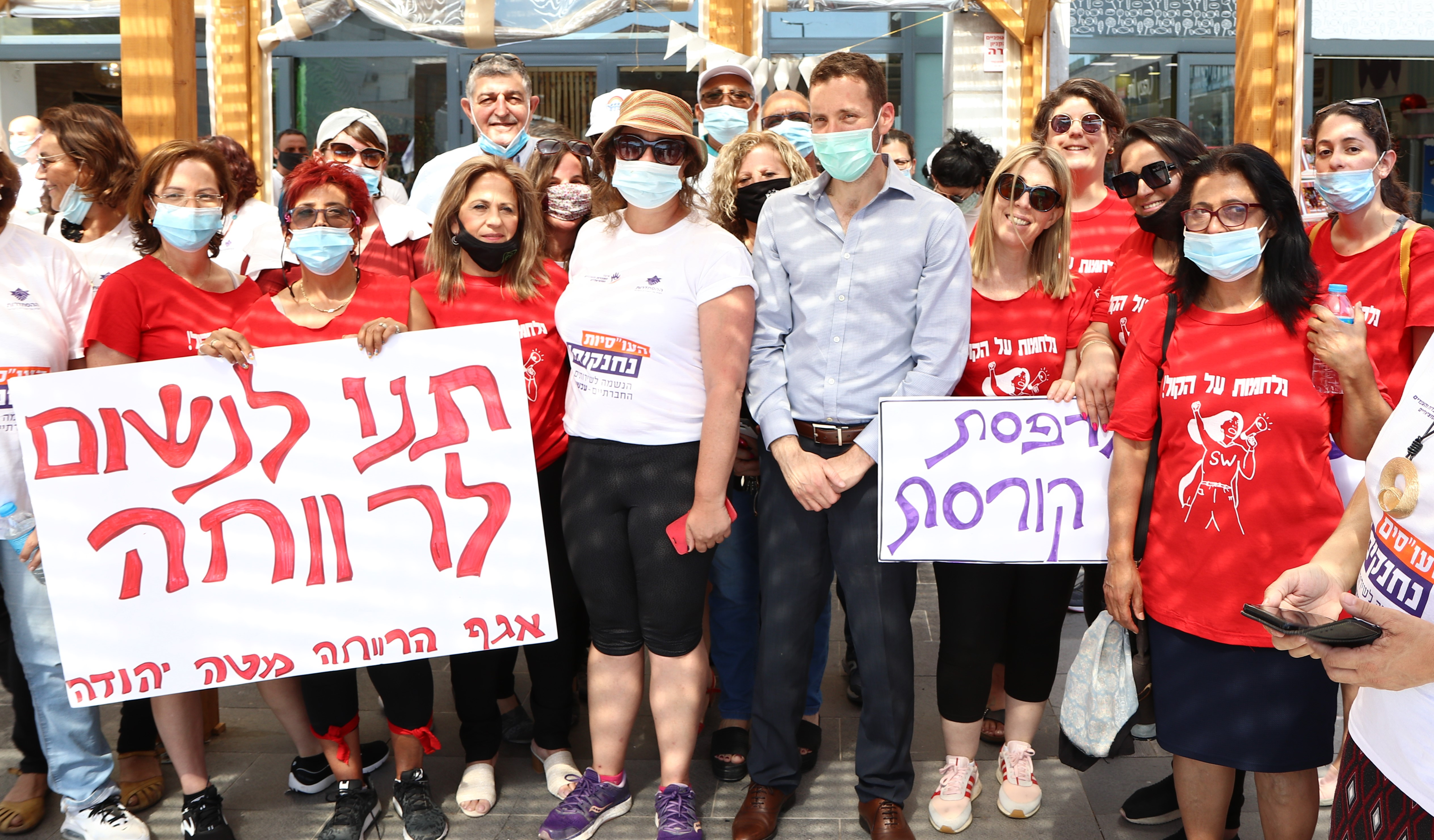 .איציק שמולי במחאת העו"סיות בבית שמש. יוני 2020 המחאה היתה על חוסר מוגנות של העו"סיות במהלך עבודתן, וגם על תנאי השכר המחפירים